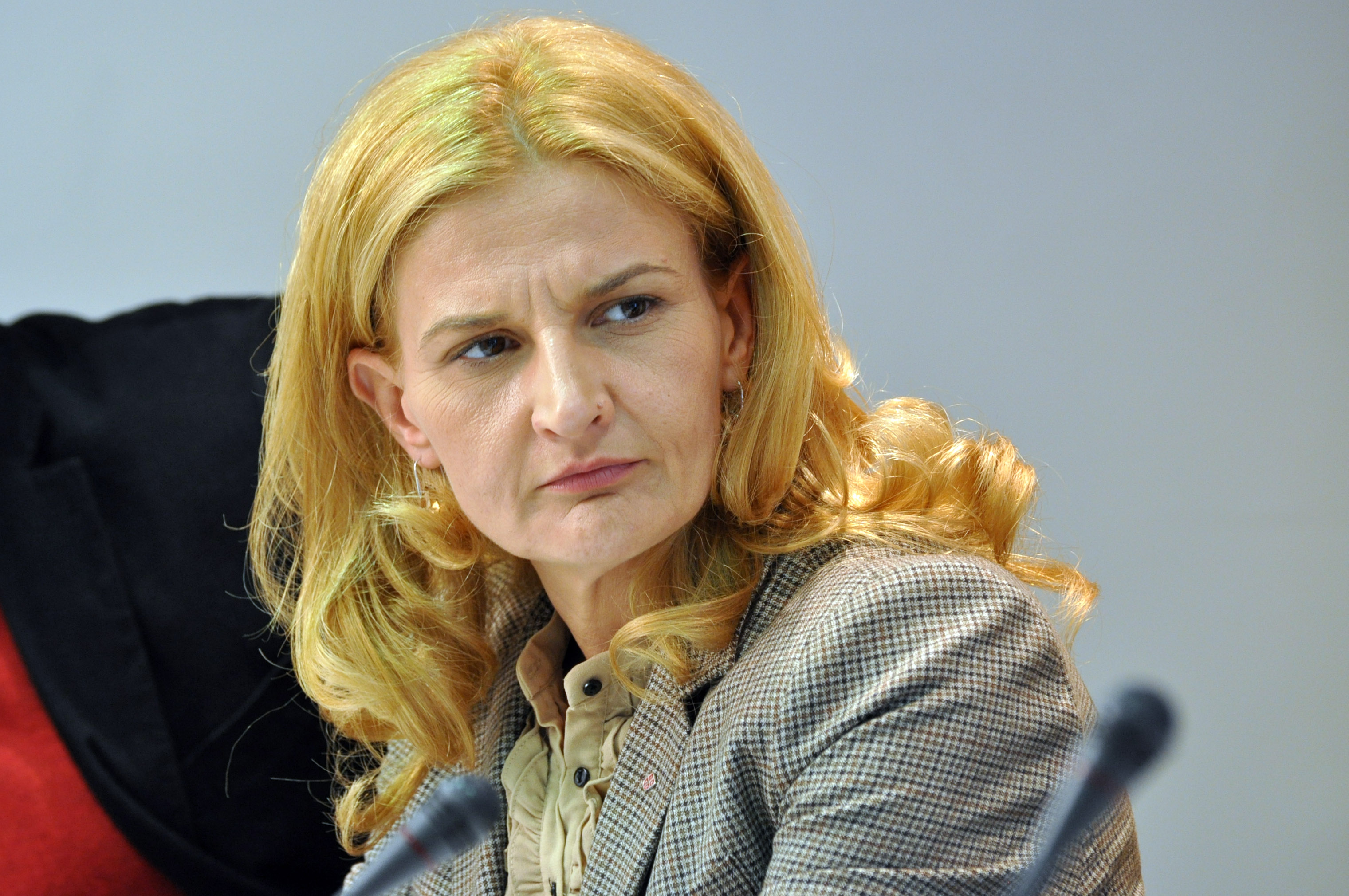 Tanja Miščević 2011